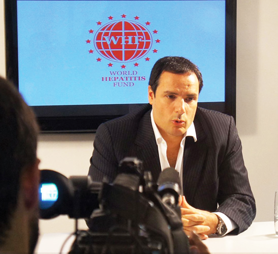 Humberto Silva concede entrevista após fundação do Fundo Mundial para as Hepatites.